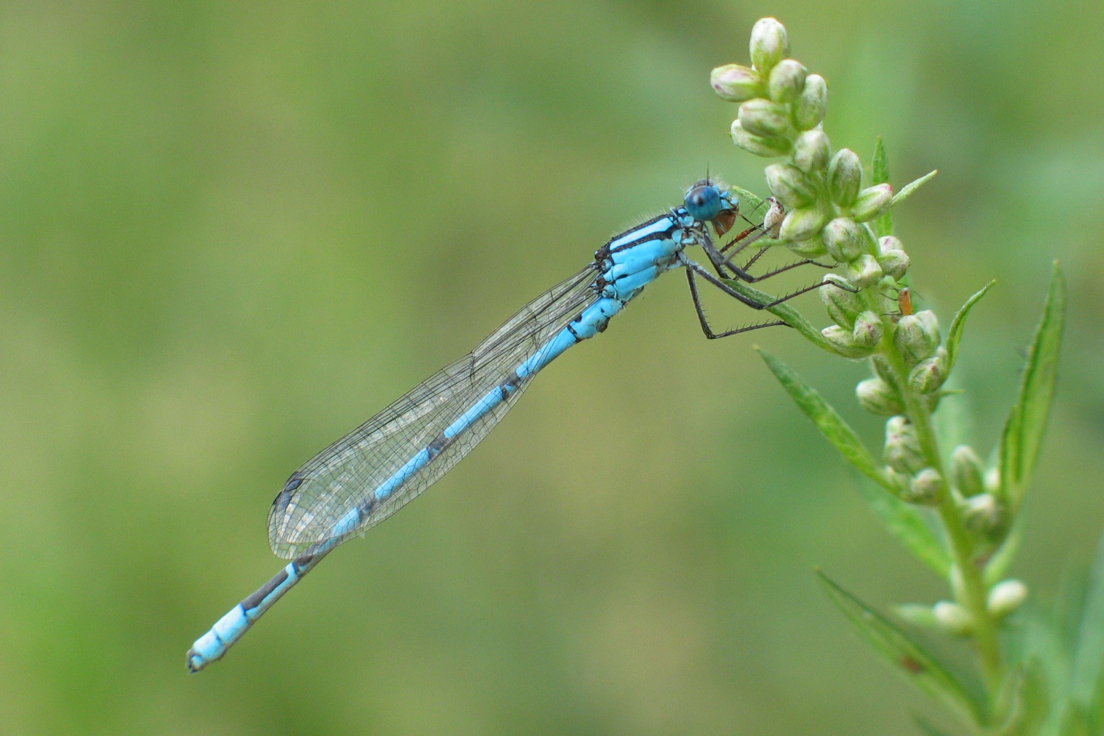 Gemeine Becherjungfer (Enallagma cyathigerum)